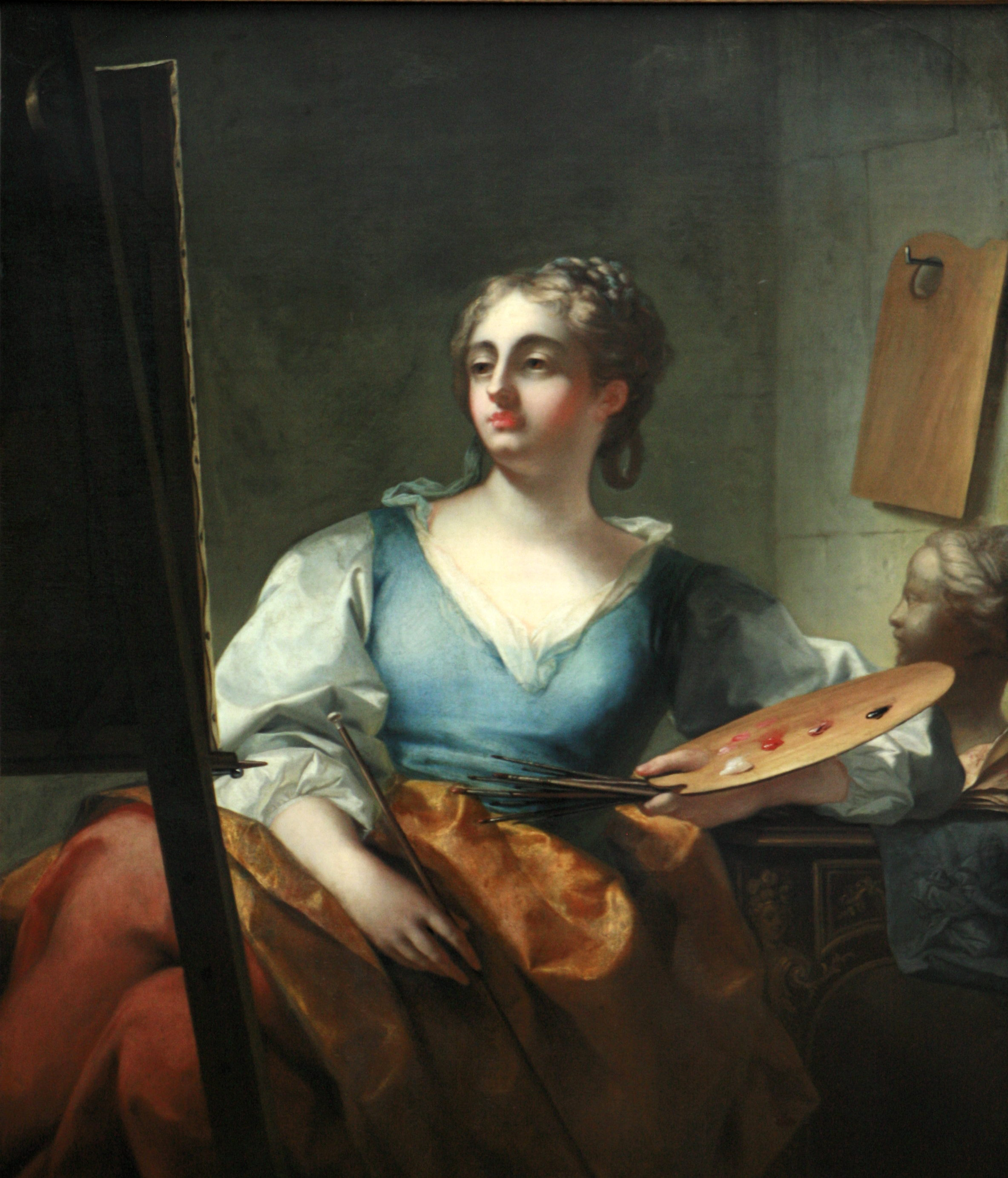 Allegory of Painting